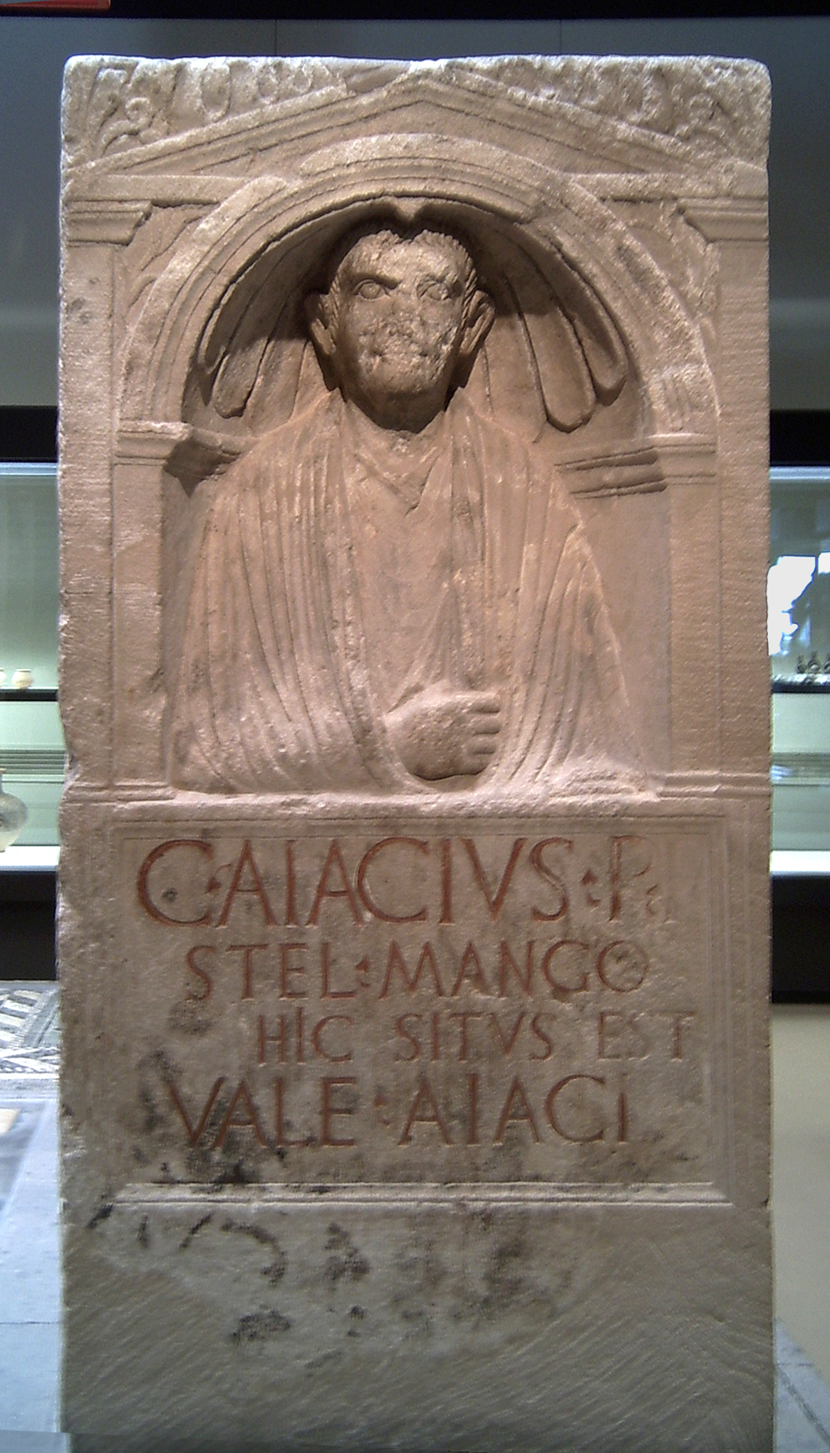 Grabdenkmal des Sklavenhändlers Caius Aiacius, FO: Köln, Bonner Str. 13a, 30-40 n. Chr., CIL XIII 8348 For other images, see gallery Römisch-Germanisches Museum.